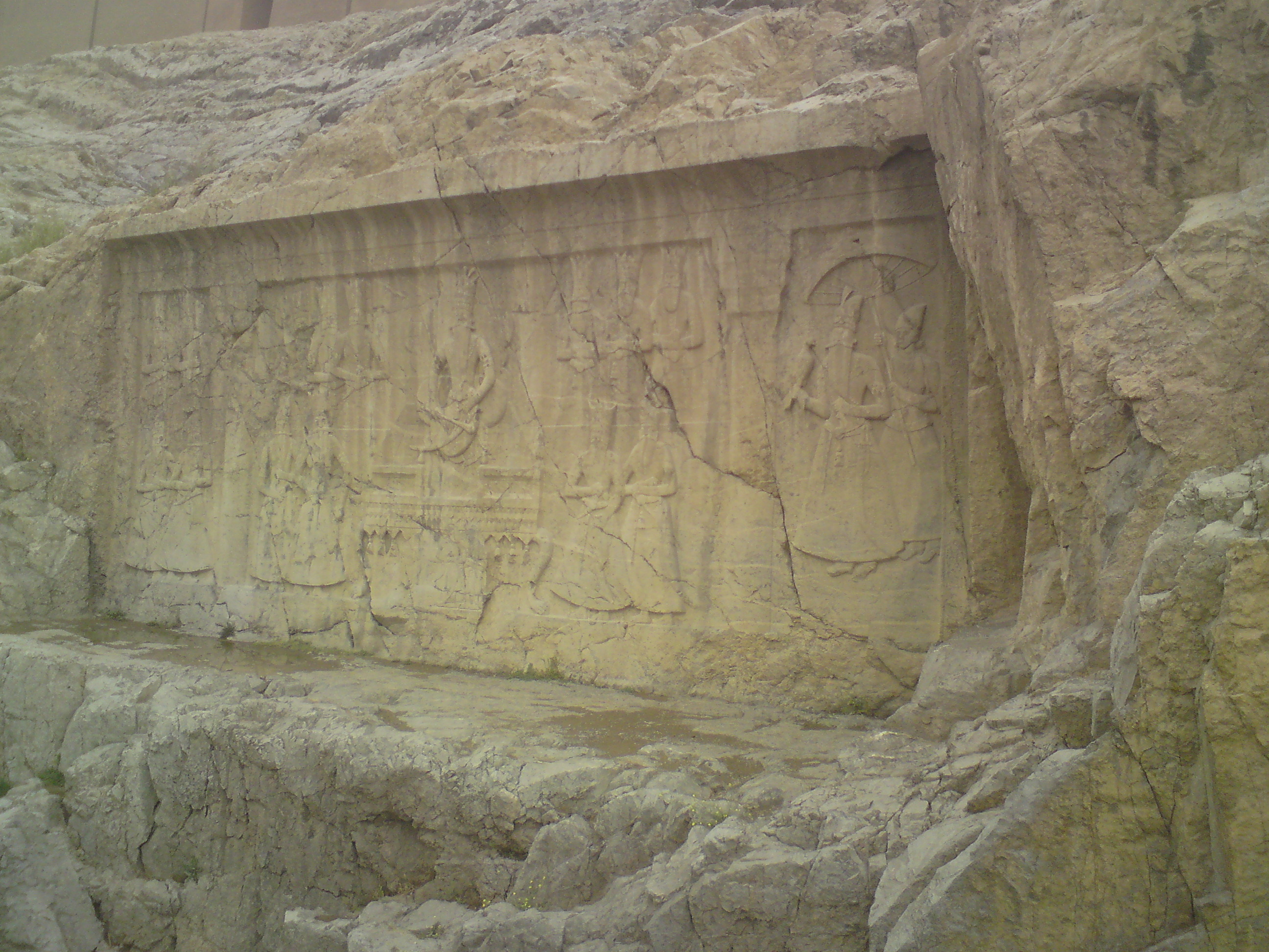 کتیبه فتحعلی شاه قاجار (چشمه علی)